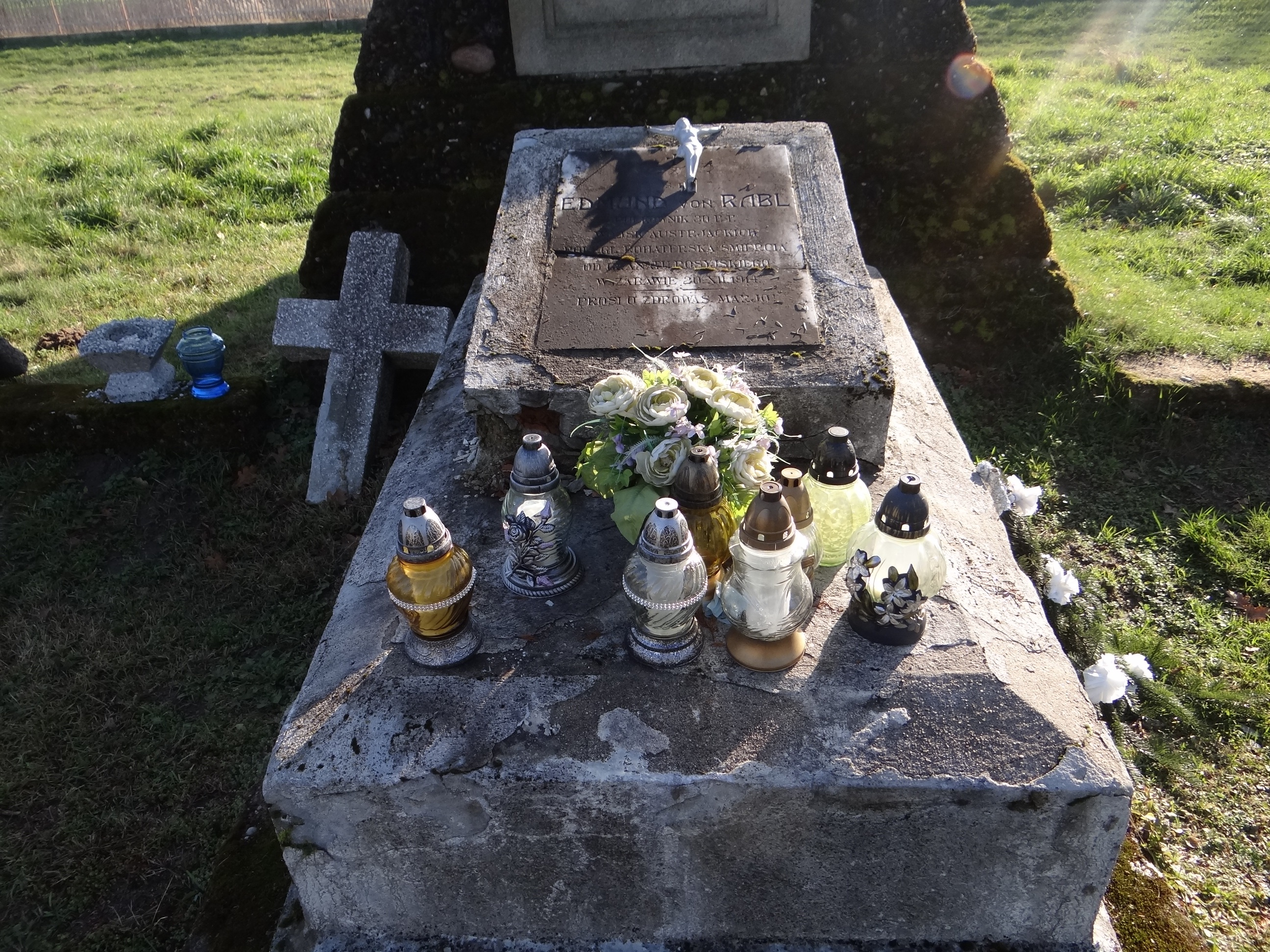 Cmentarz wojenny nr 266 - Borzęcin